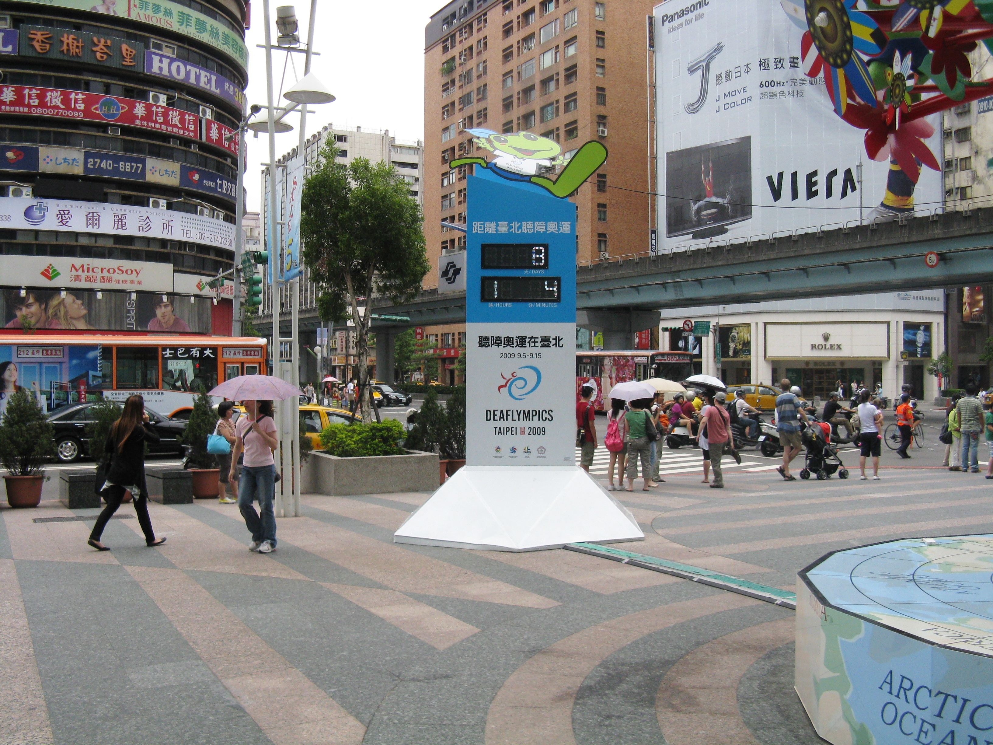 臺北捷運忠孝復興站廣場的2009聽障奧運倒數計時鐘塔。